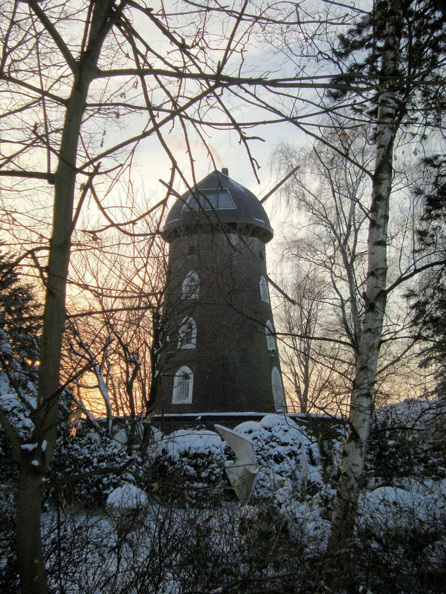 Will Brüll, Mühle mit Skulpturen, Meerbusch-Osterath